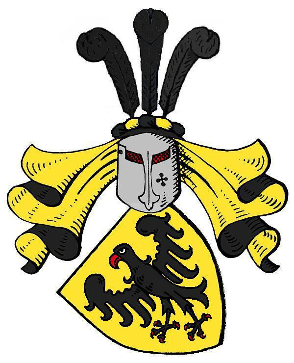 Familienwappen